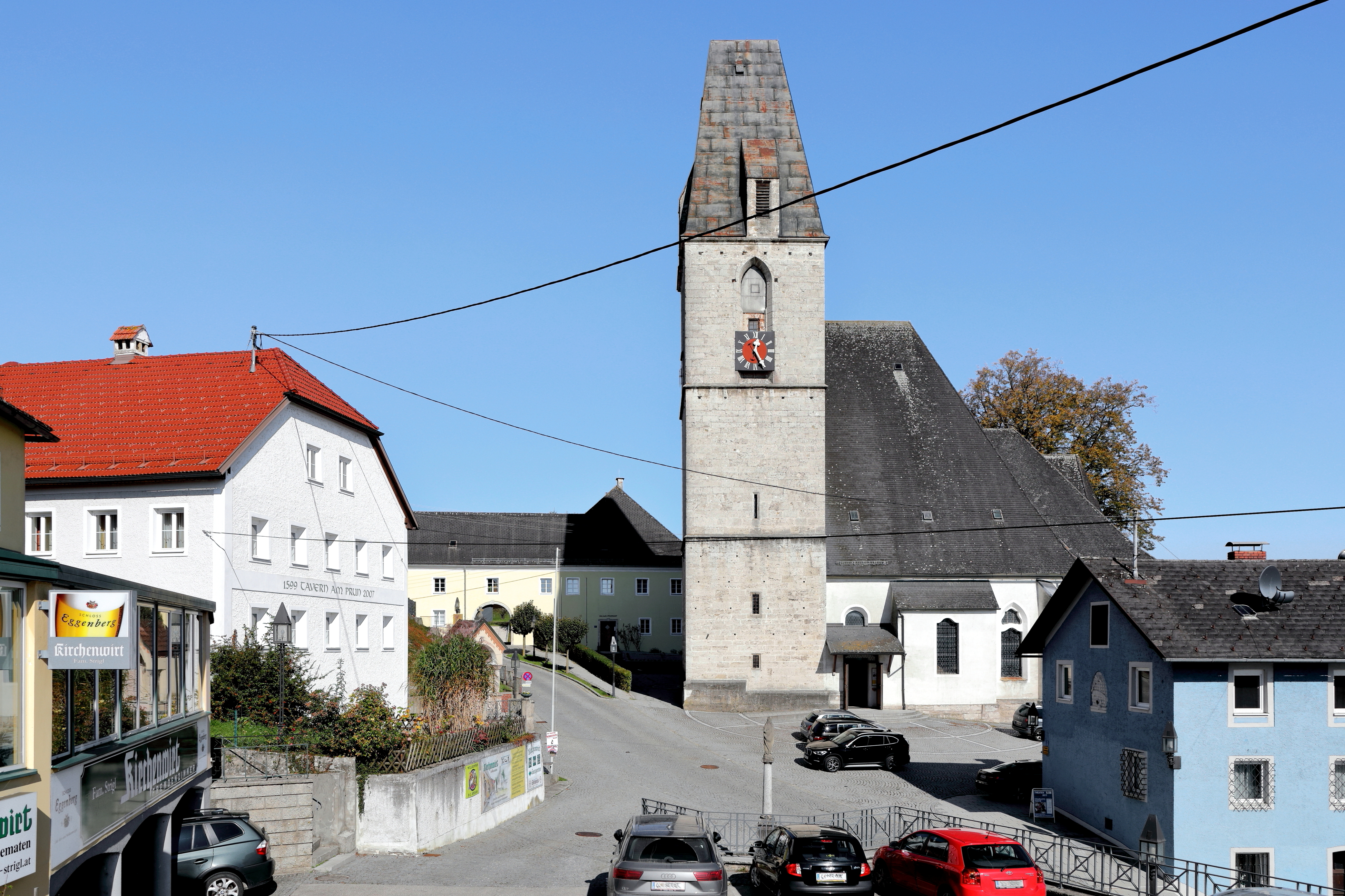 Das Ortszentrum der oberösterreichischen Gemeinde Kematen an der Krems mit der röm.-kath. Pfarrkirche hl. Martin.